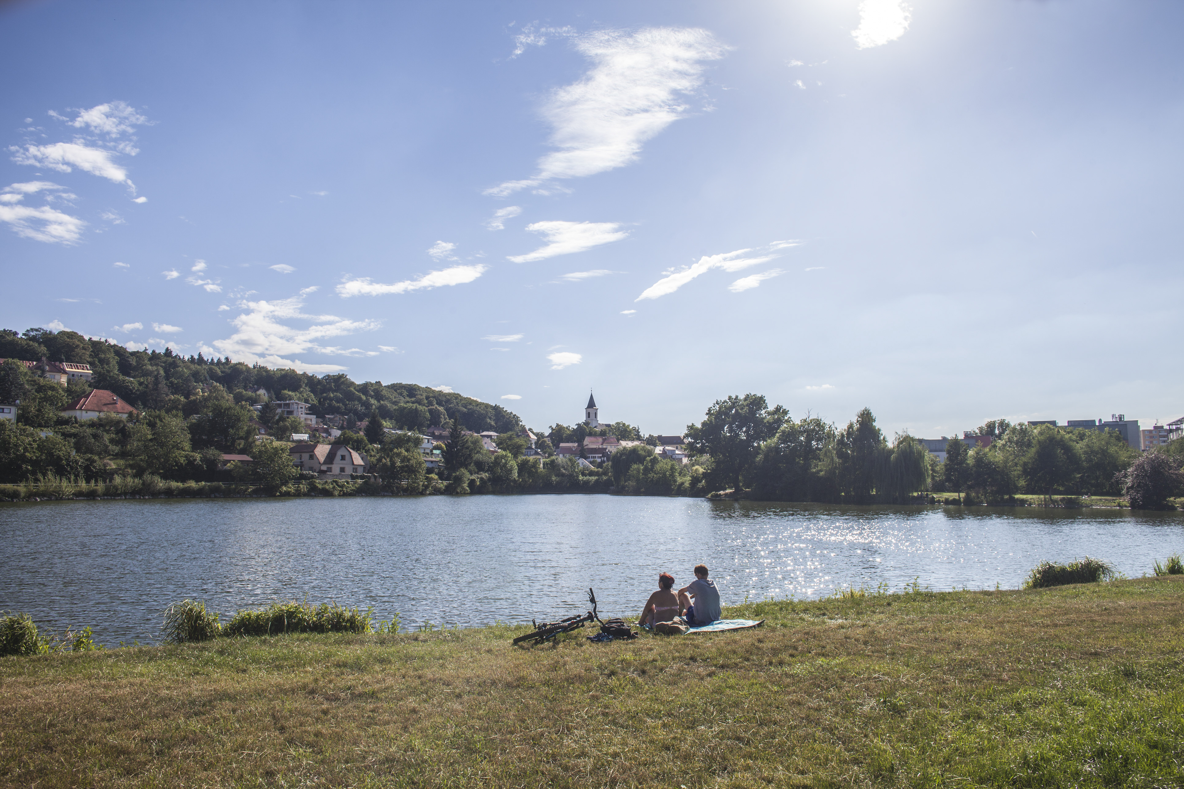 Либоцкое озеро рядом с учебным центром Прага - Кристалл. Фото: Дита Хавранкова